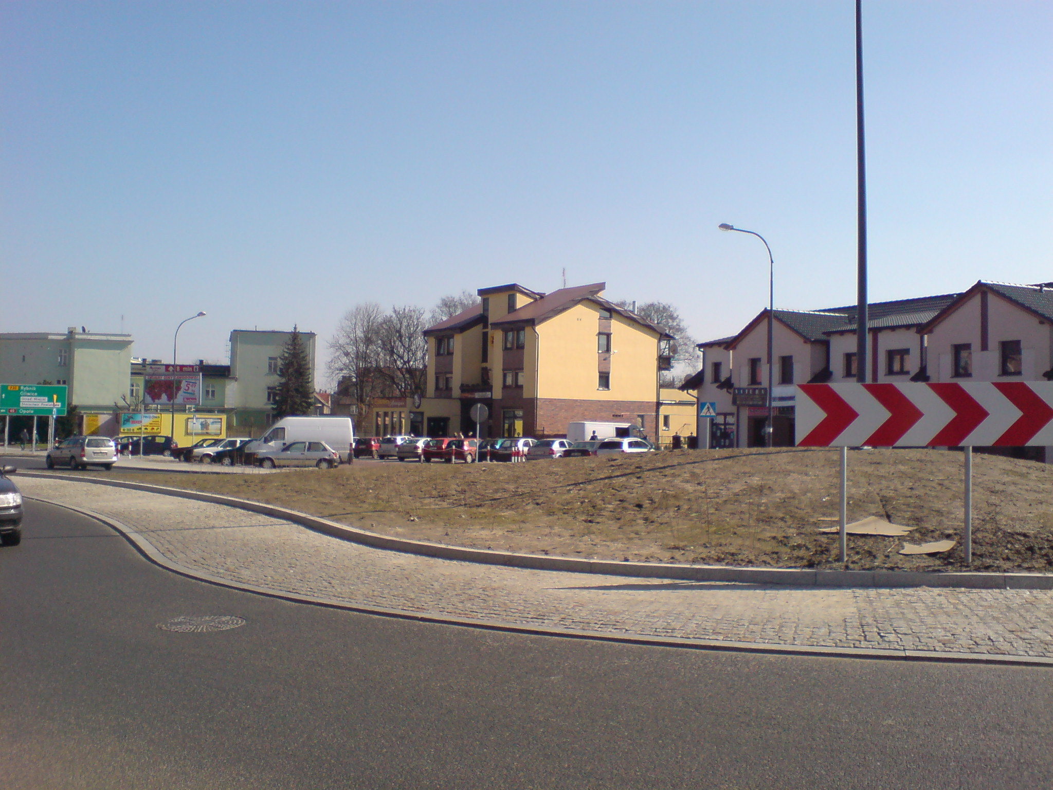 Rondo ulic Kozielskiej, Głubczyckiej, Londzina, Mariańskiej i Mikołaja w Raciborzu.